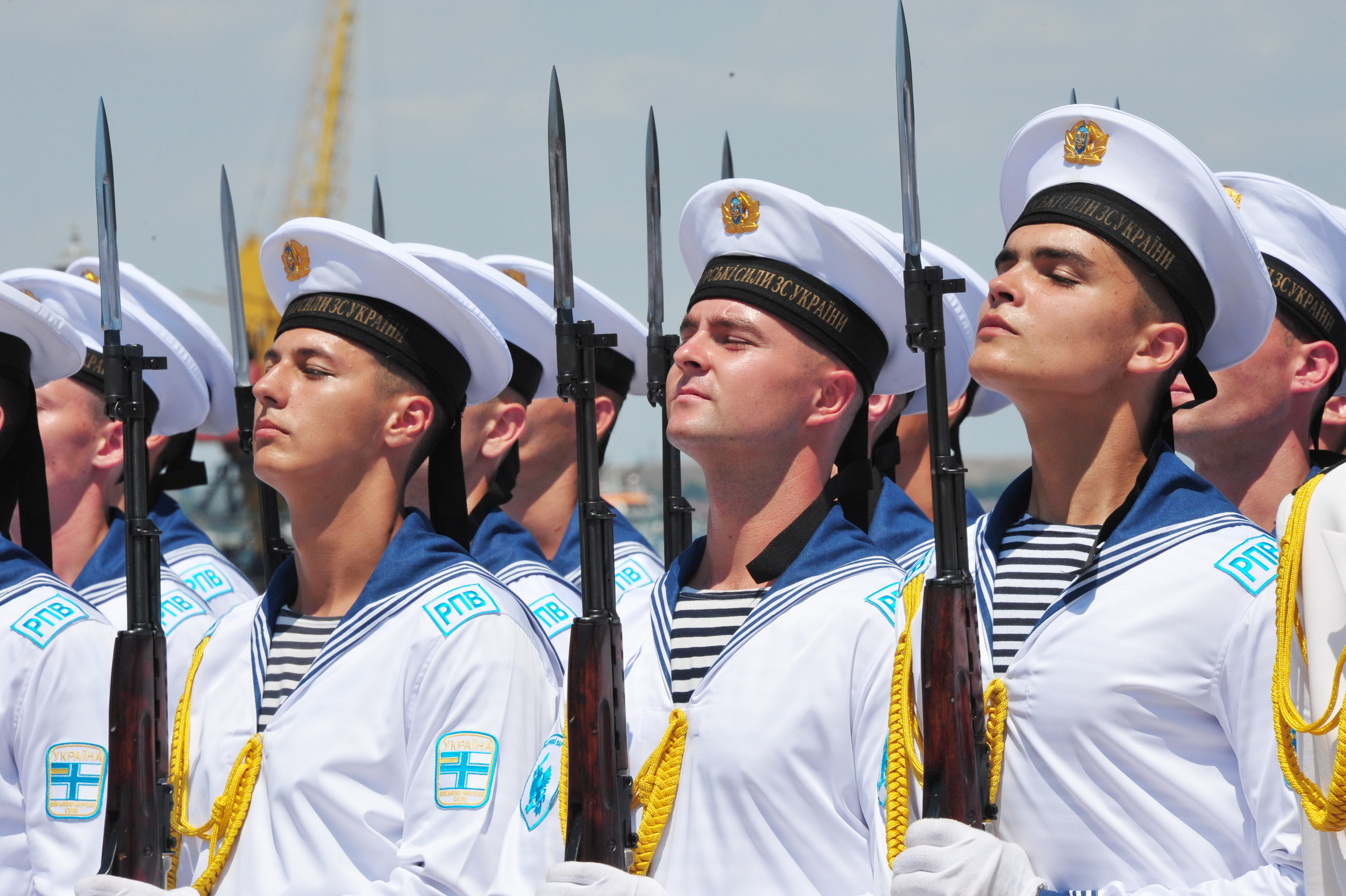 3 липня в Одесі відбулися урочистості з нагоди святкування Дня Військово-Морських Сил ЗС України Фото: Олександр Шепелєв